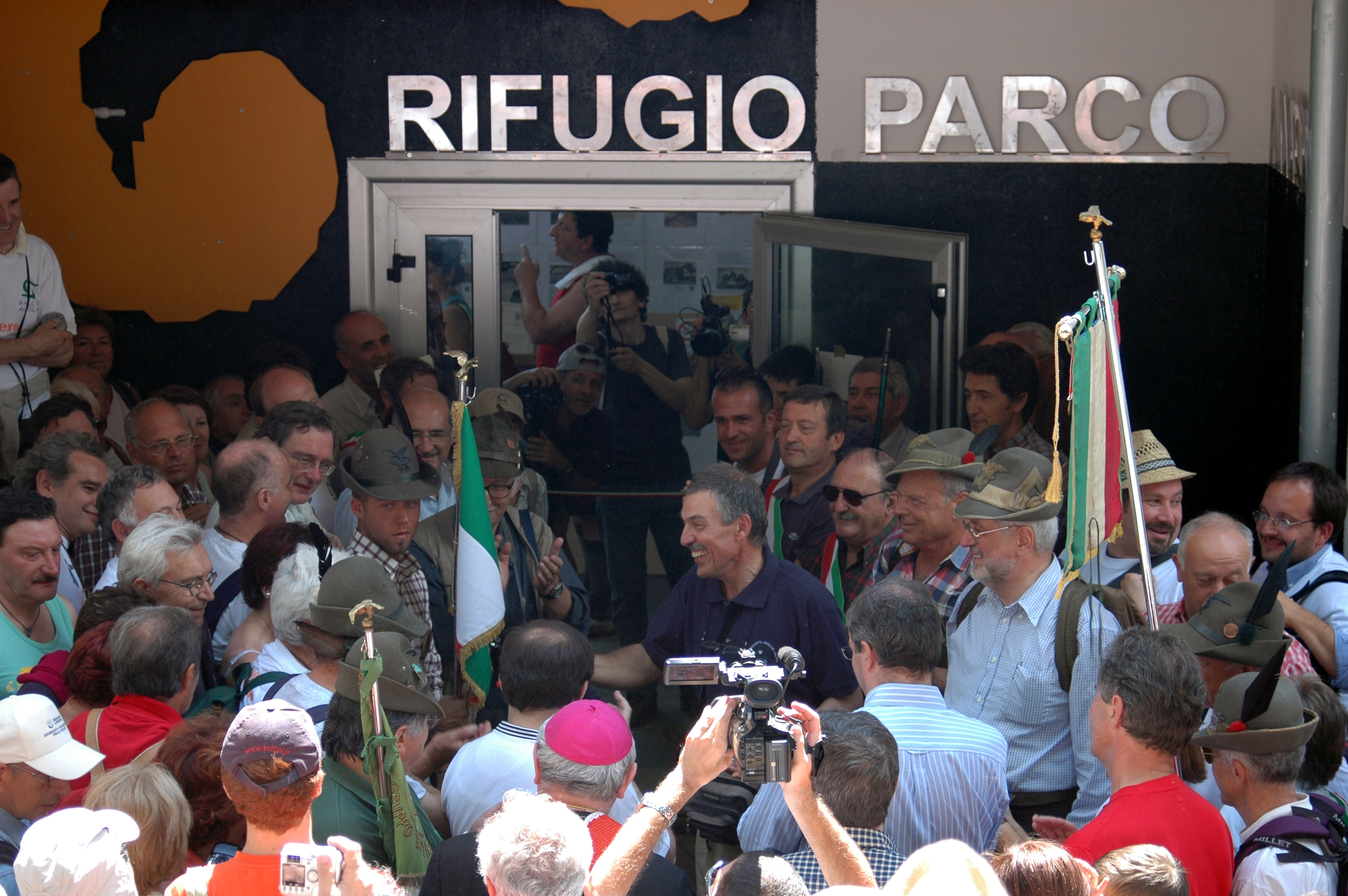 La folla e il presidente del Parco Roberto Costa poco prima del taglio del nastro del nuovo Rifugio Parco Antola nel luglio 2007 (foto A.Schiavi)